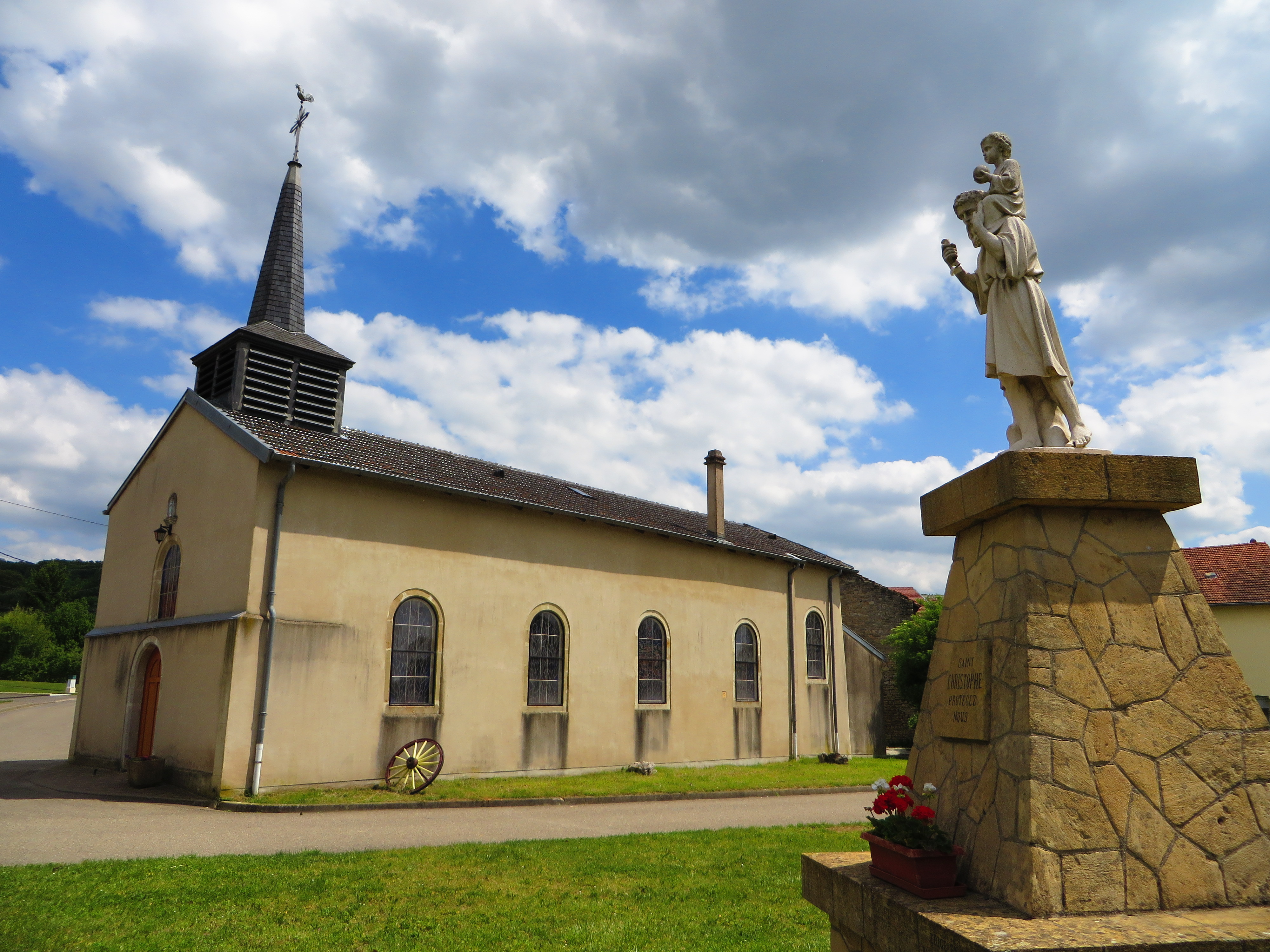 Basse Vigneulles eglise